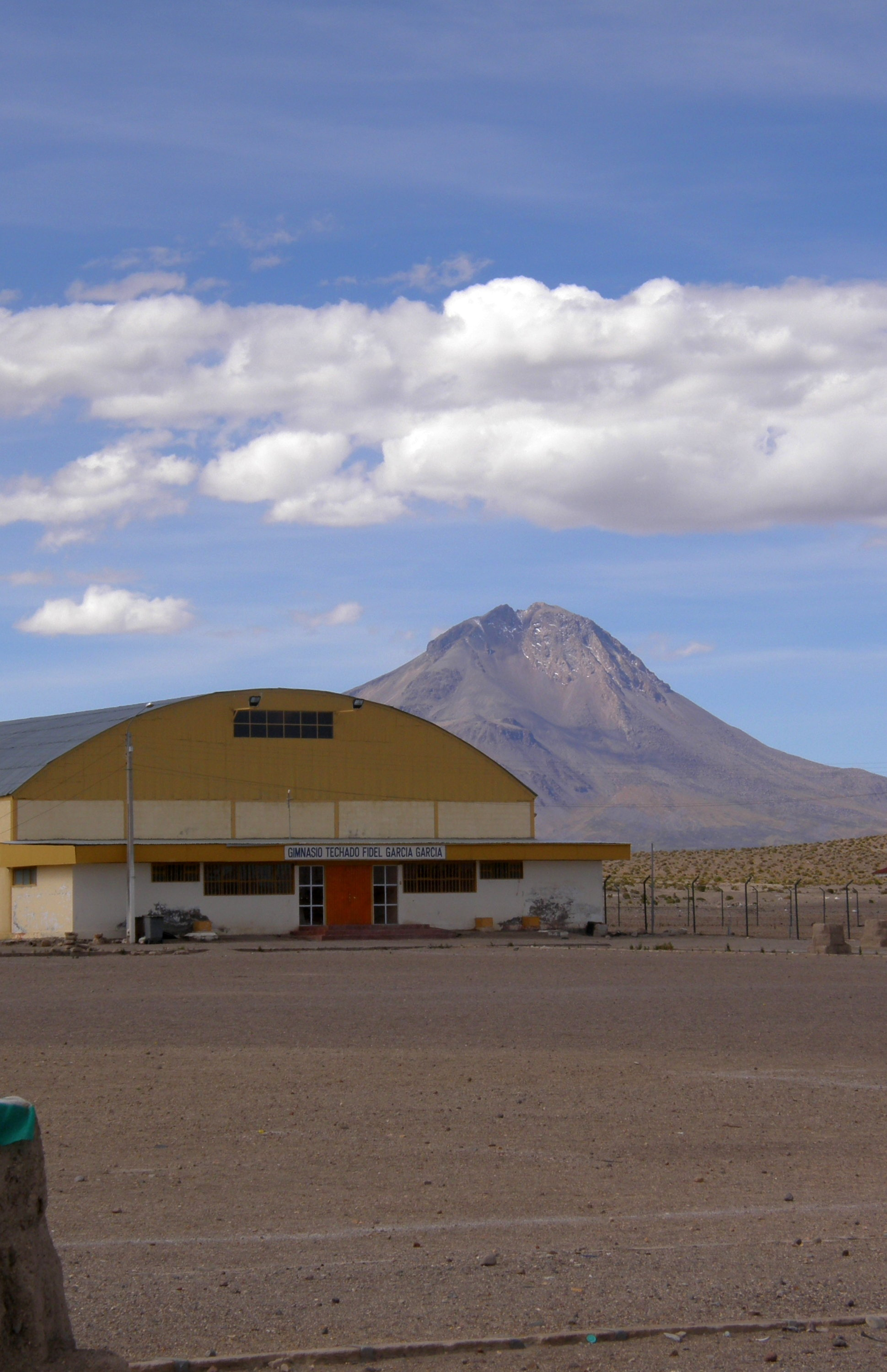 Volcan Tata Sabaya (Tata Sawaya) 5430 mètres situé dans le département de Oruro, Bolivie ; vue depuis Colchane, province de Tamarugal, région deTarapacá, Chili.